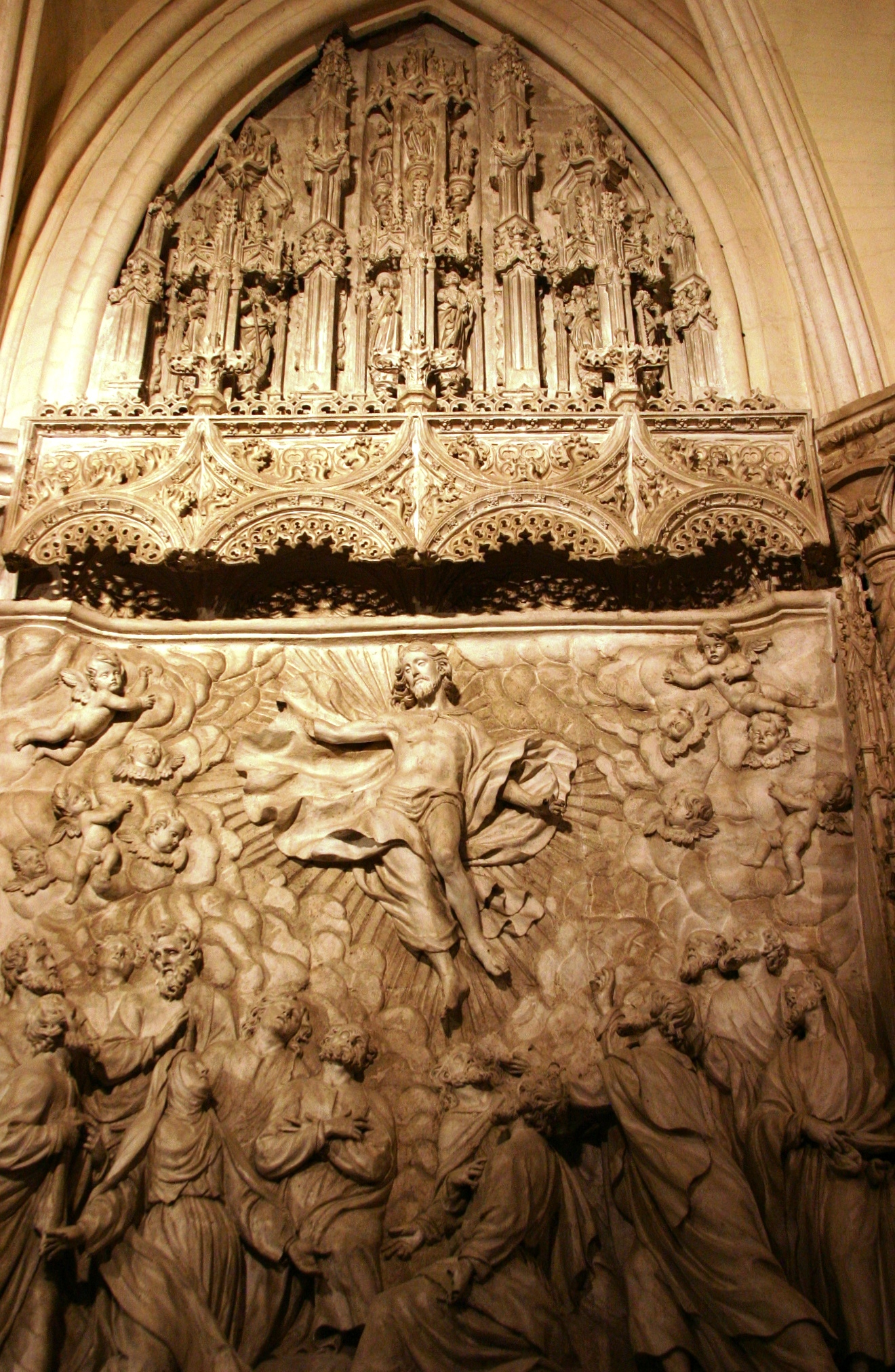 Interior da Catedral